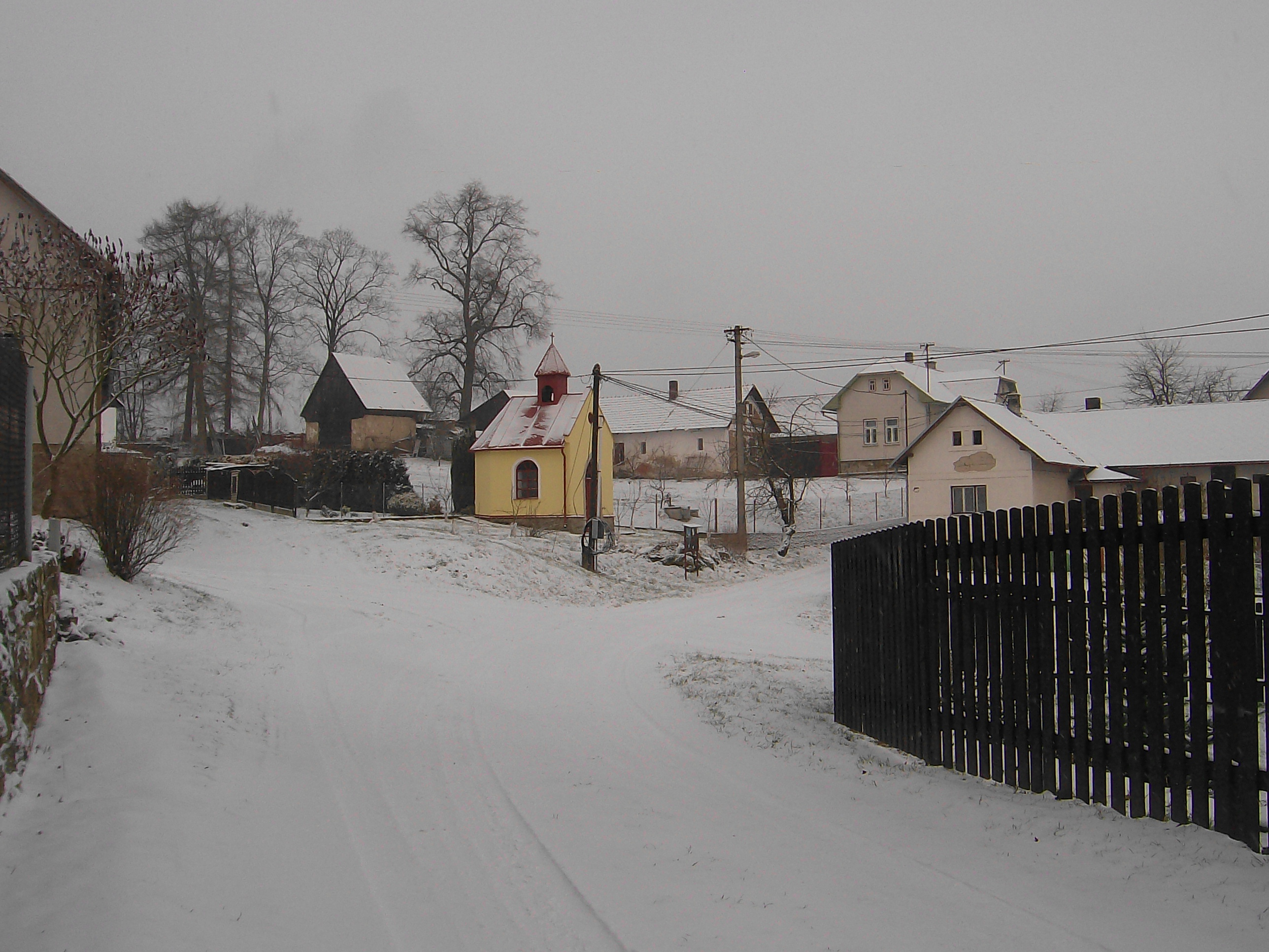 Kochánov v zimě